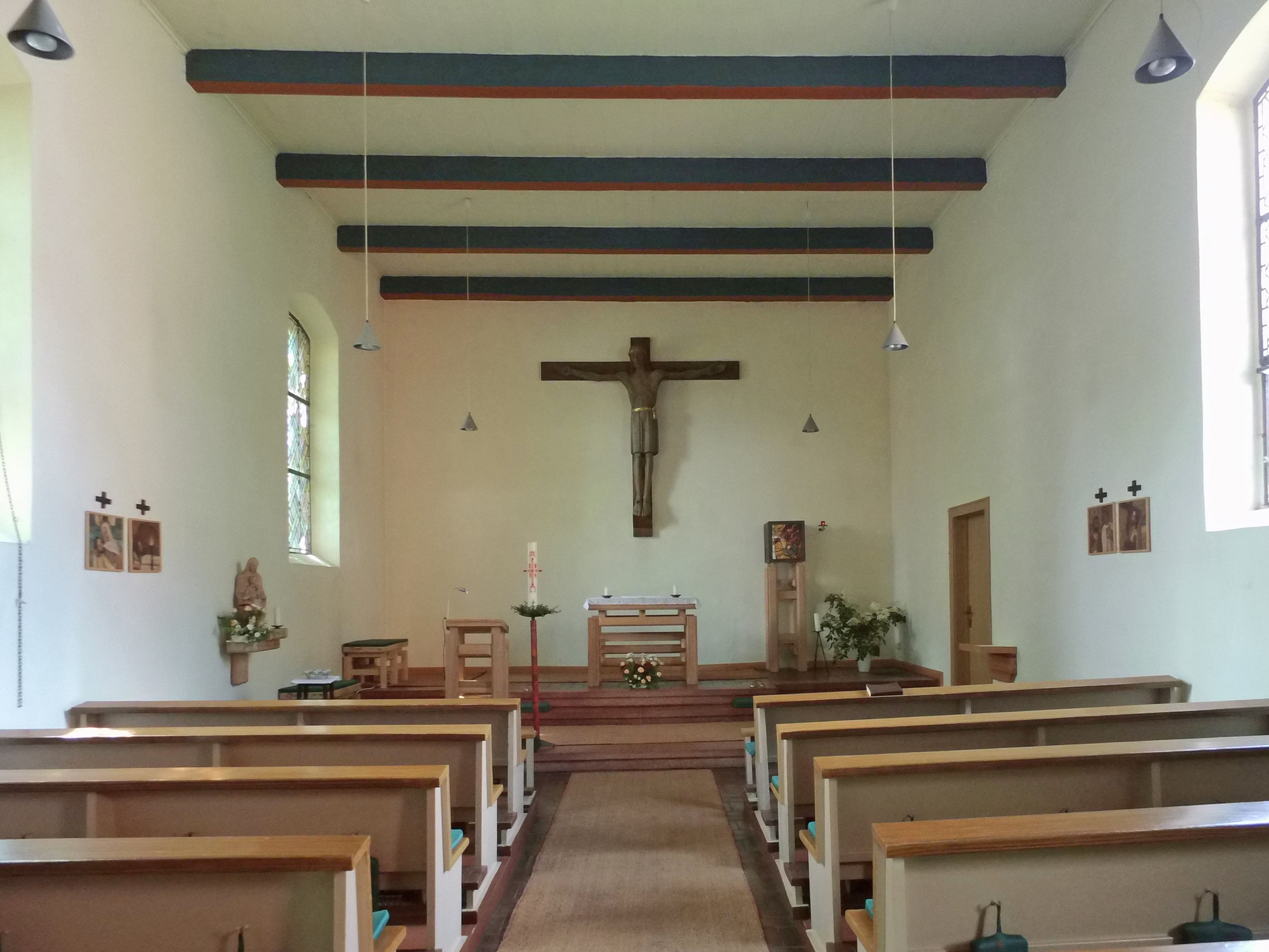 Katholische Kirche "Mariä Himmelfahrt" in Beetzendorf (Sachsen-Anhalt)